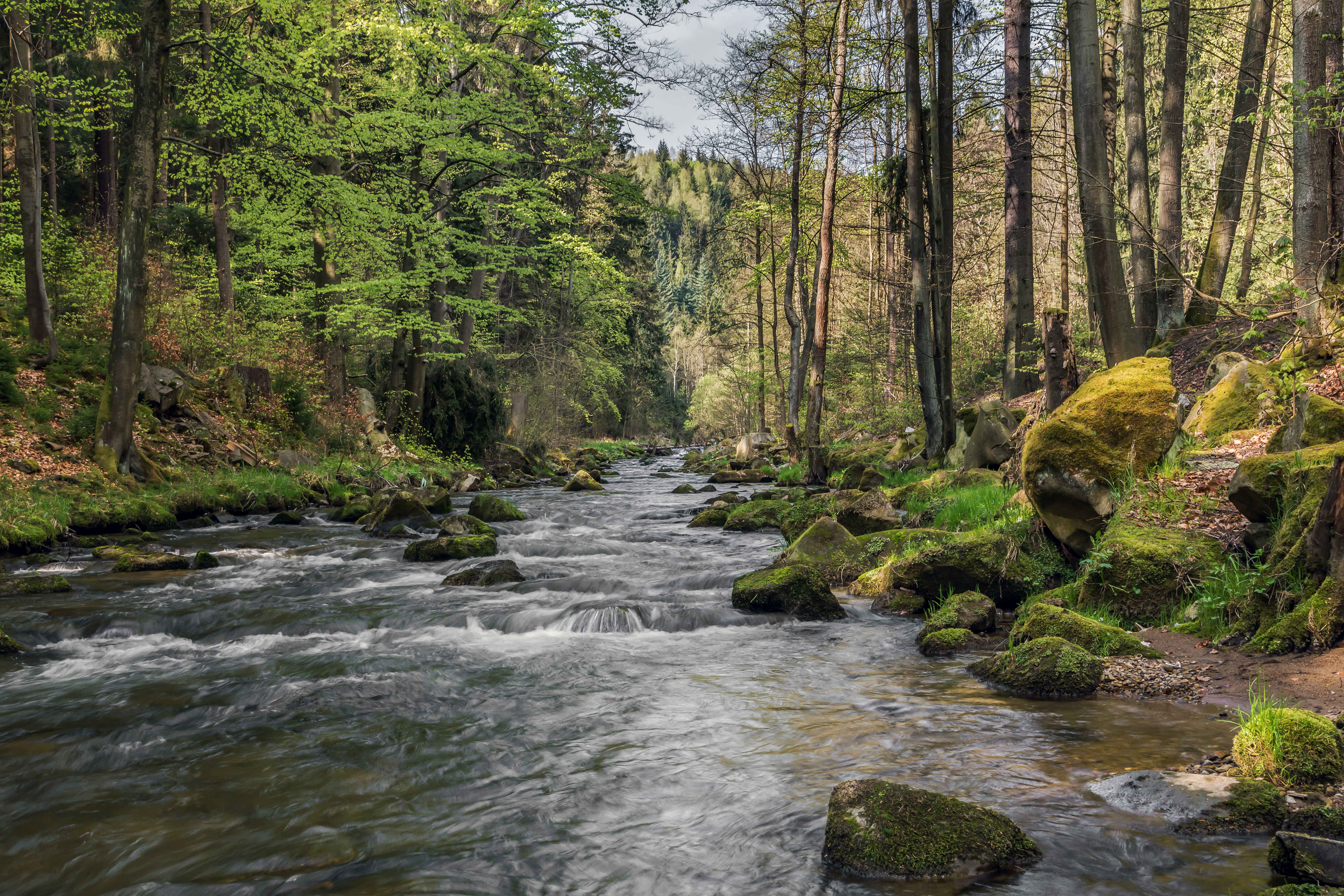 Flusslauf der Reinerzer Weistritz (Bystrzyca Dusznicka) im Höllental (Piekielna Dolina) zwischen Altheide-Bad (Polanica Zdrój) und Rückers (Szczytna), Niederschlesien, Polen.